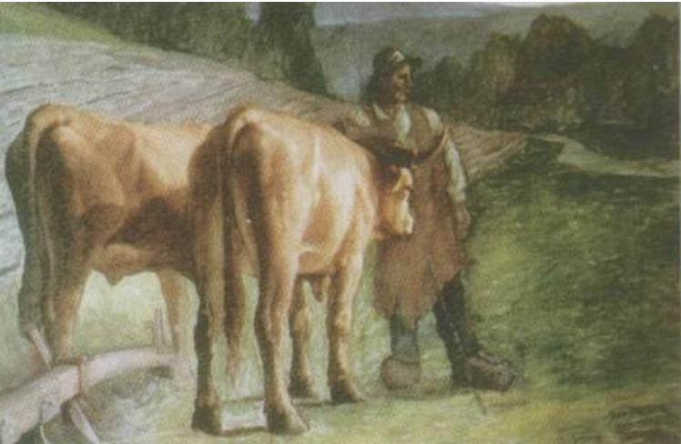 "Les boeufs", toile sans doute inachevée de Jean Teilliet, peintre natif de Saint-Junien (Haute-Vienne).